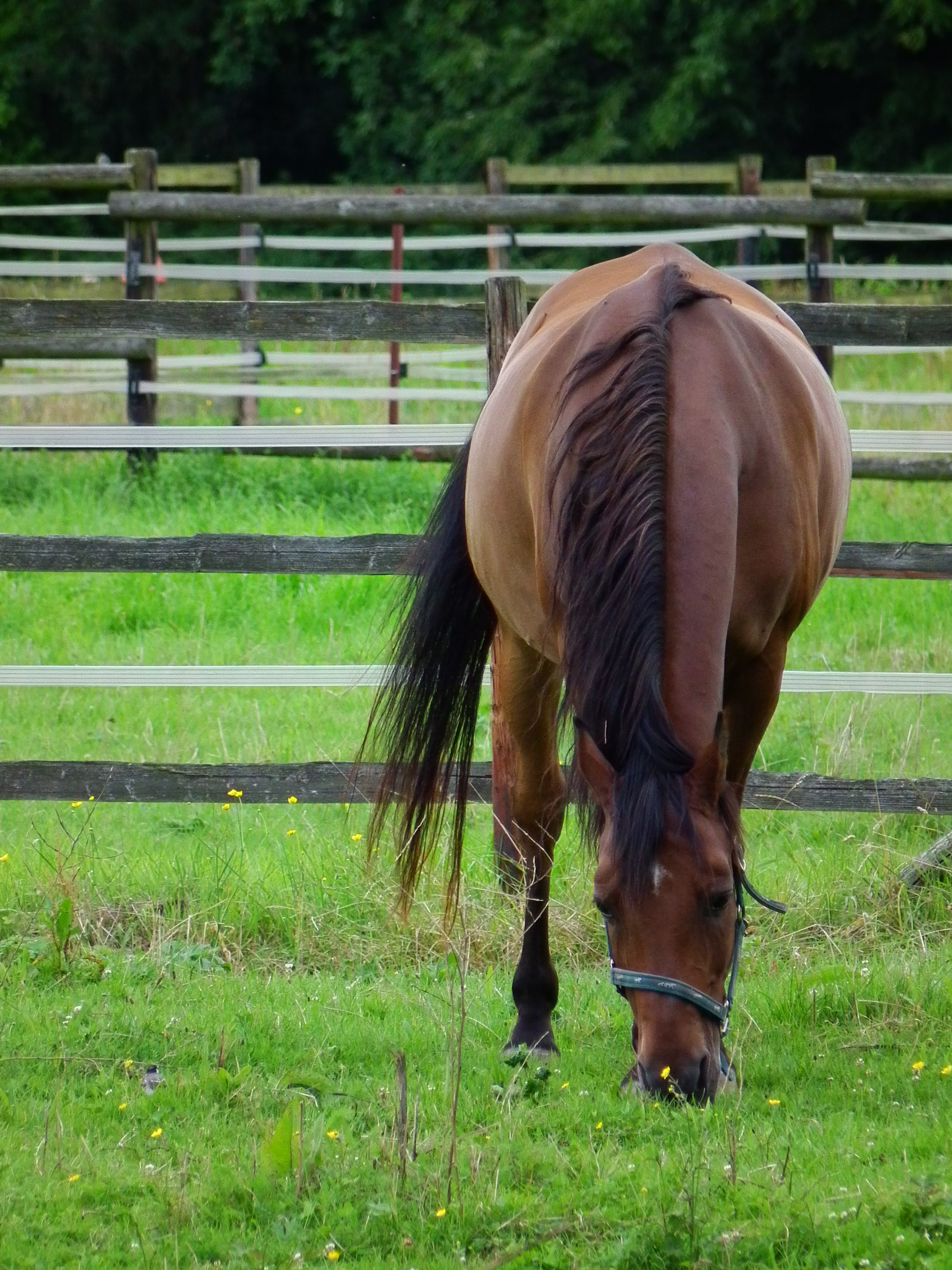 Grasendes Pferd auf einer Koppel, begleitet von Bachstelzen (Motacilla alba), fotografiert in der Nähe von Bad Schönborn (Baden-Württemberg, Deutschland)